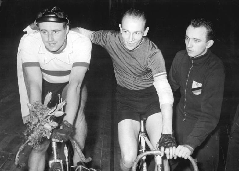 Werner Malitz, Günther Simon, Siegfried Köhler Zentralbild Bey-Wen 24.1.1958 Winterbahn-Premiere der Radamateure In der Berliner Werner Seelenbinder-Halle fand am Donnerstag, dem 23.1.1958, die winterbahn-Premiere der Radamateure statt. UBz: Die Siegerehrung im 1000-m-Malfahren. Sieger wurde überraschend Werner Malitz (Einheit, Berlin) (Mitte) vor Günther Simon (links). Rechts:Olympiateilnehmer Siegfried Köhler.